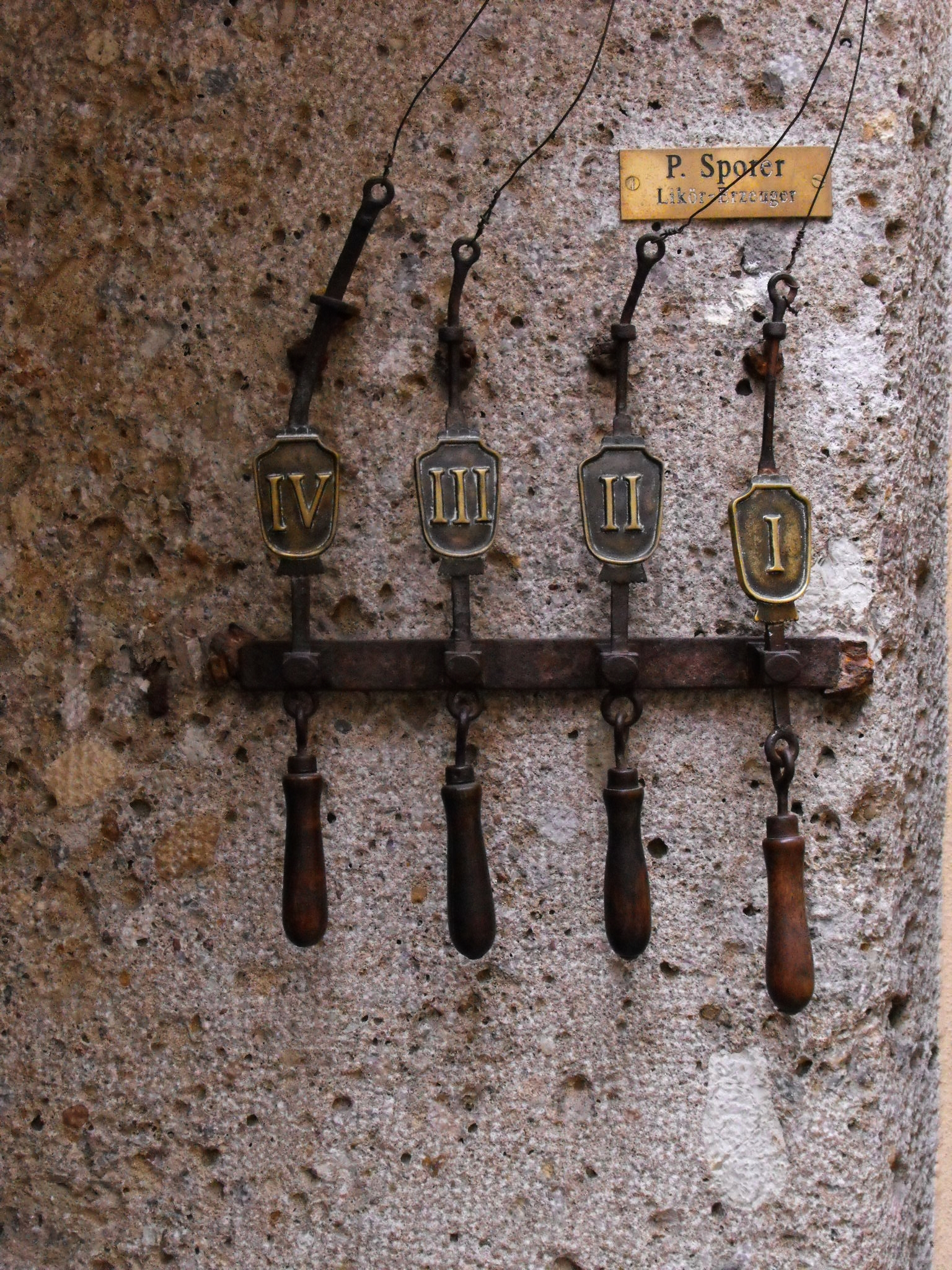 Mechanischer Klingelzug in der Getreidegasse in Salzburg